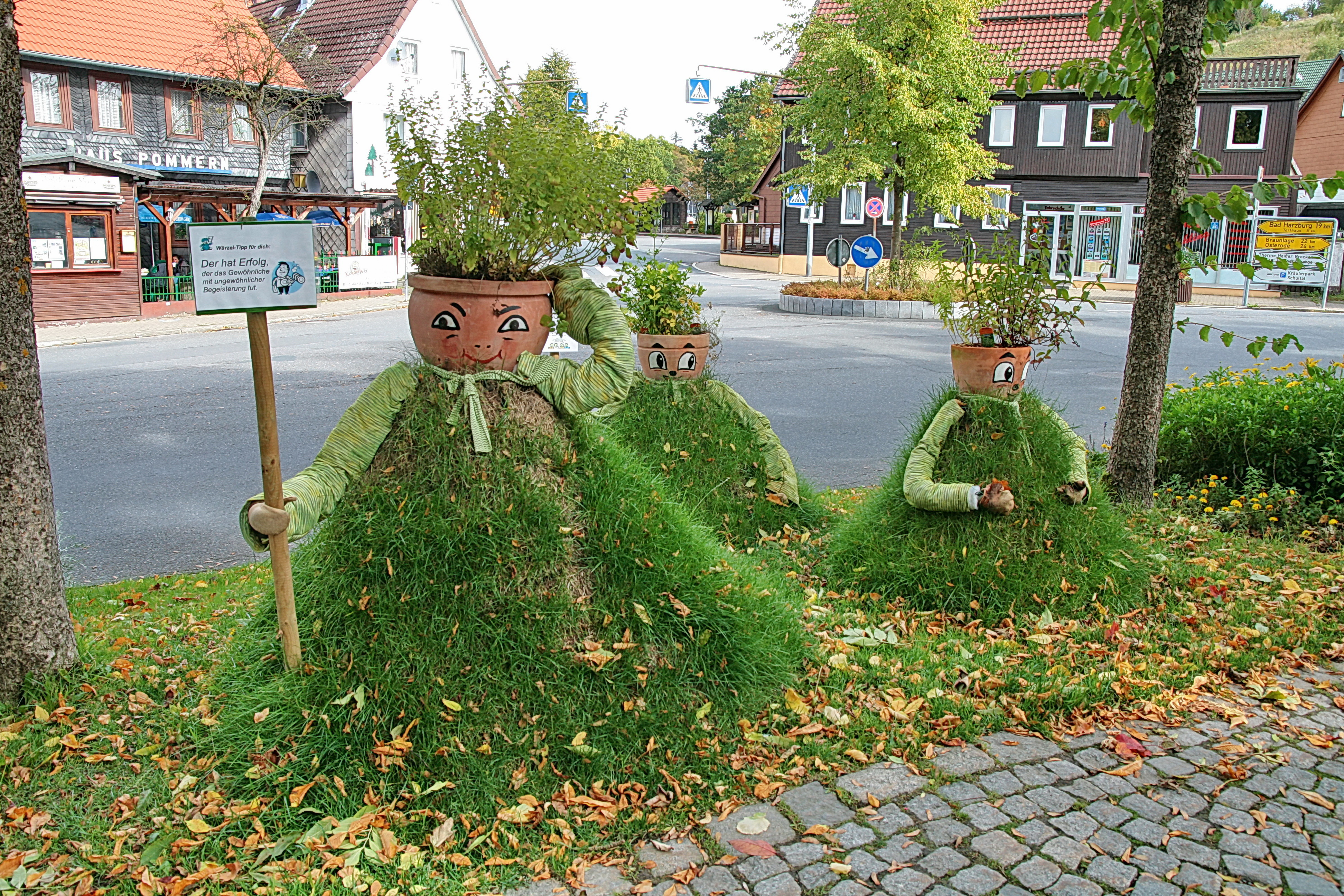 Altenau im Harz in Niedersachsen, Deutschland